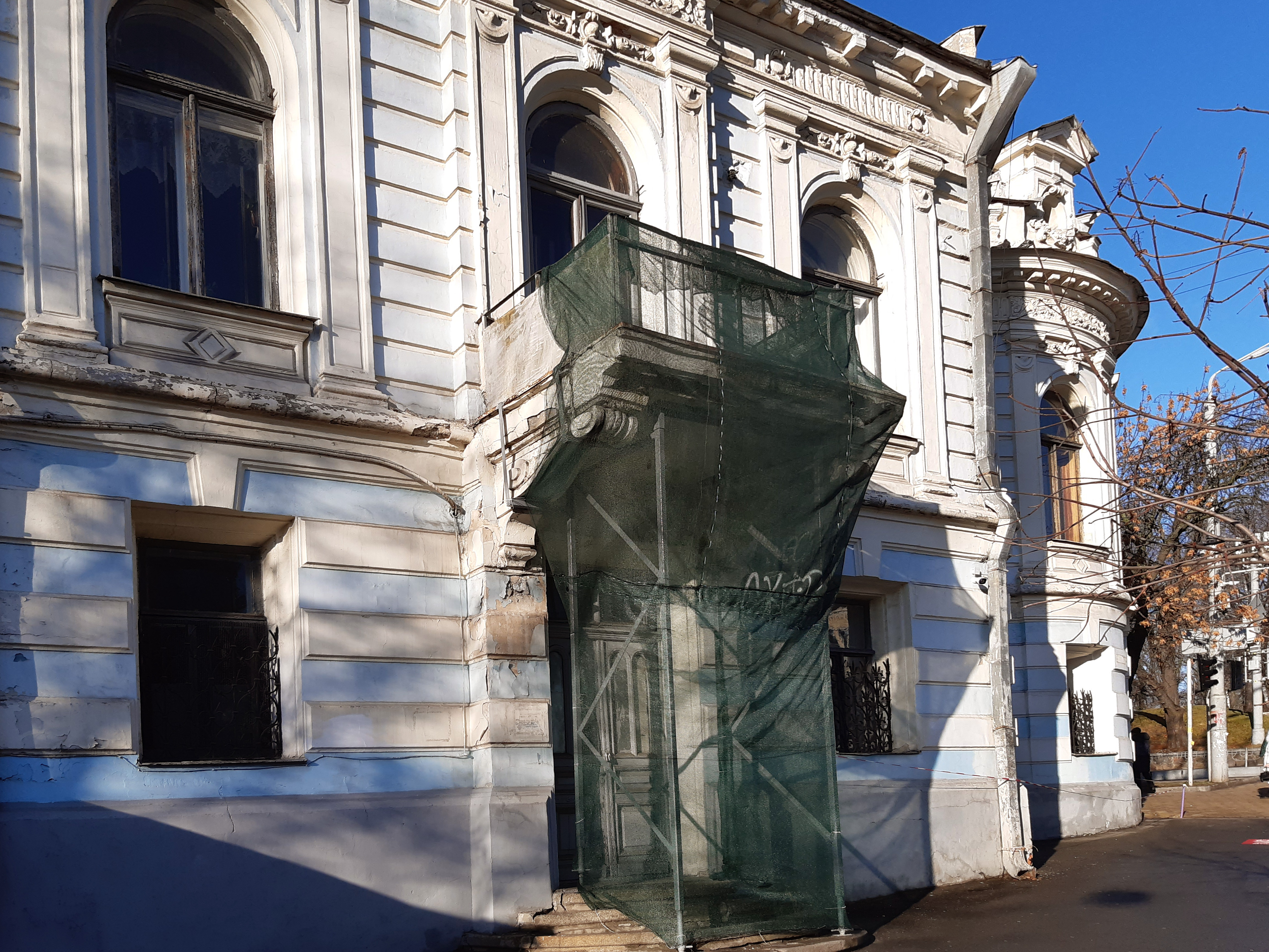 Руйнація балкону. Маєток Олександра Терещенка (Республіканська медична бібліотека), Київ, вул. Л. Толстого, 07/2